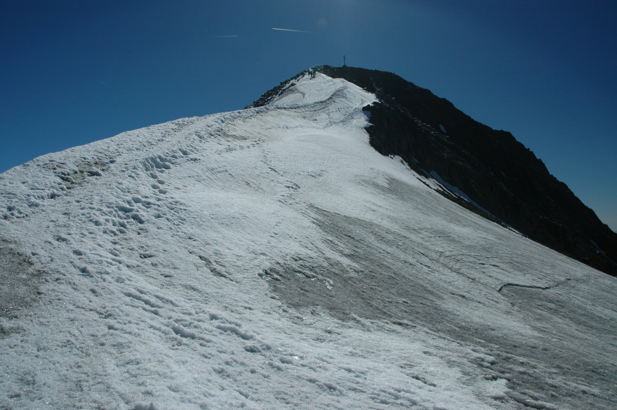 Vrcholový hřebínek Similaunu